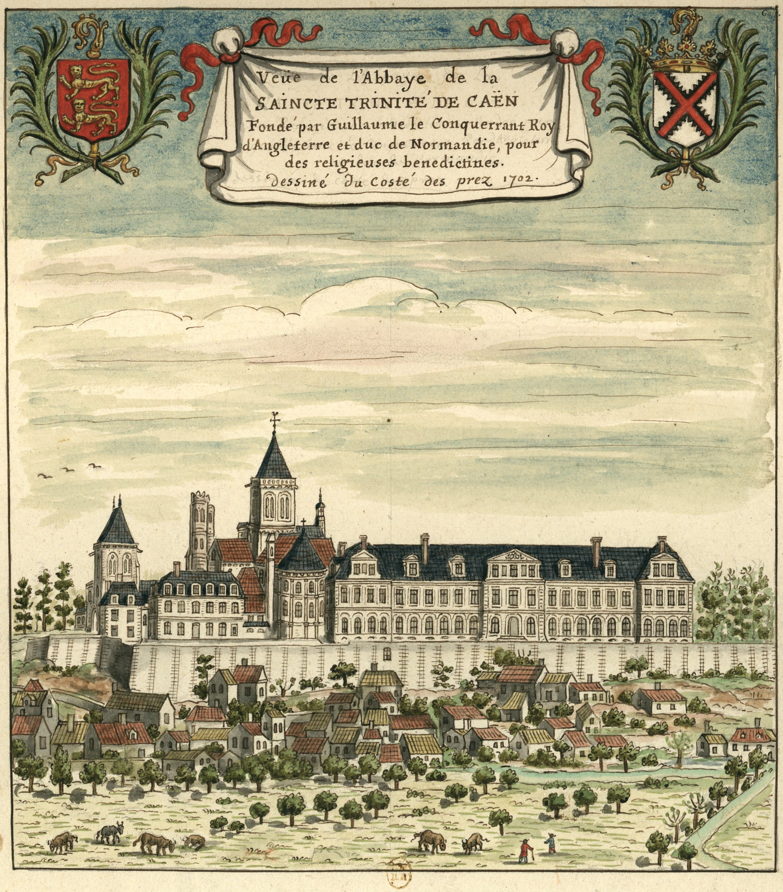 « Veüe de l'Abbaye de la SAINCTE TRINITE DE CAEN fondé par Guillaume le Conquerrant Roy d'Angleterre et duc de Normandie, pour des religieuses benedictines. dessiné du costé des prez »